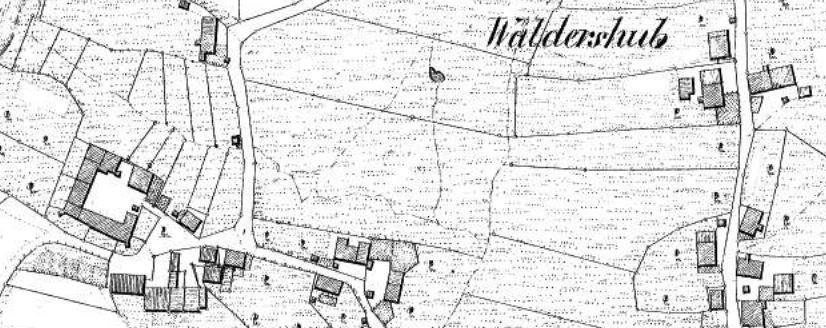 Wäldershub mit Schloss (ganz links) auf der Flurkarte: Kartenblatt NO LVI 73 Stand 1829 [Quelle: Staatsarchiv Ludwigsburg]